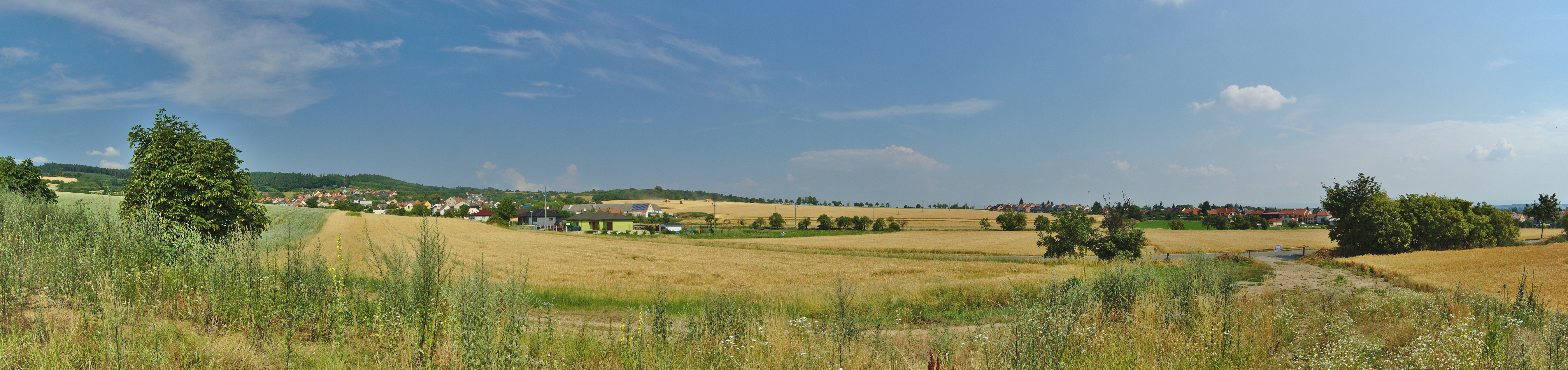 Panoramatický pohled na Slatinky a Lípy od jihovýchovdu, okres Prostějov